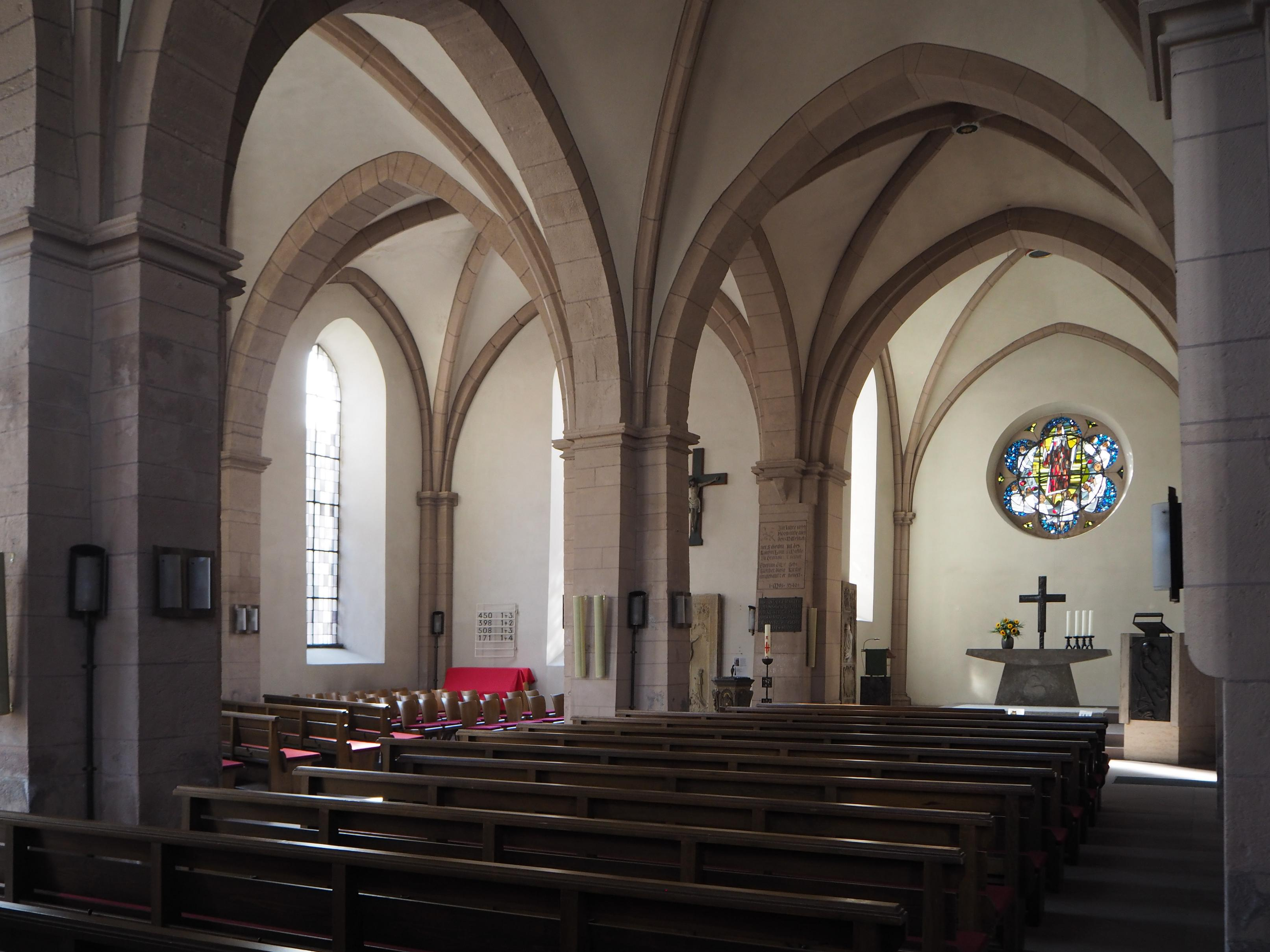 Bodenwerder (Niedersachsen), St. Nicolai, Inneres nach Süden